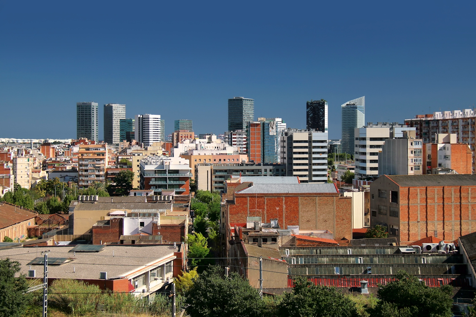 L'Hospitalet de Llobregat.